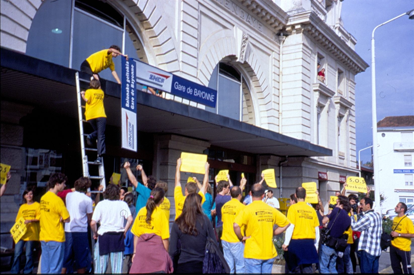 DEMO. Baionako SNFC tren geltokiaren kartelaren ordezkapena.